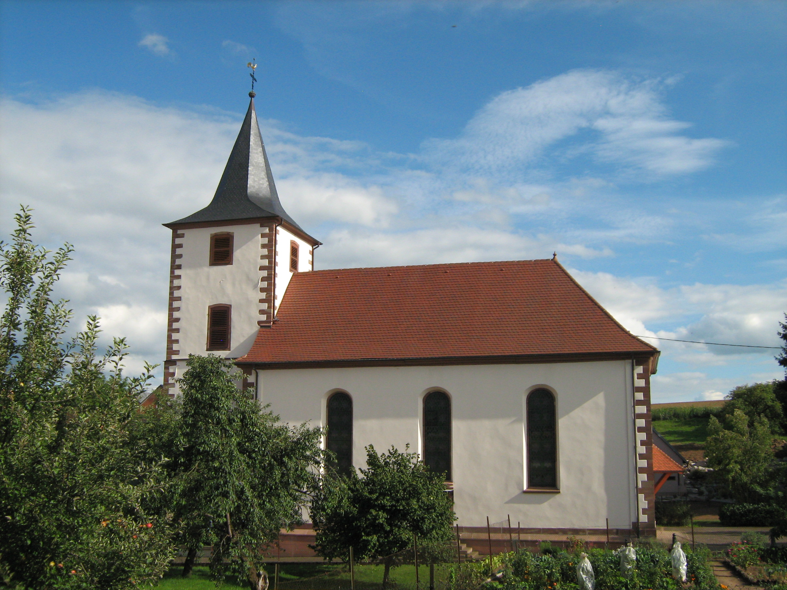 Photo de l'église d'Aldorf à Alteckendorf